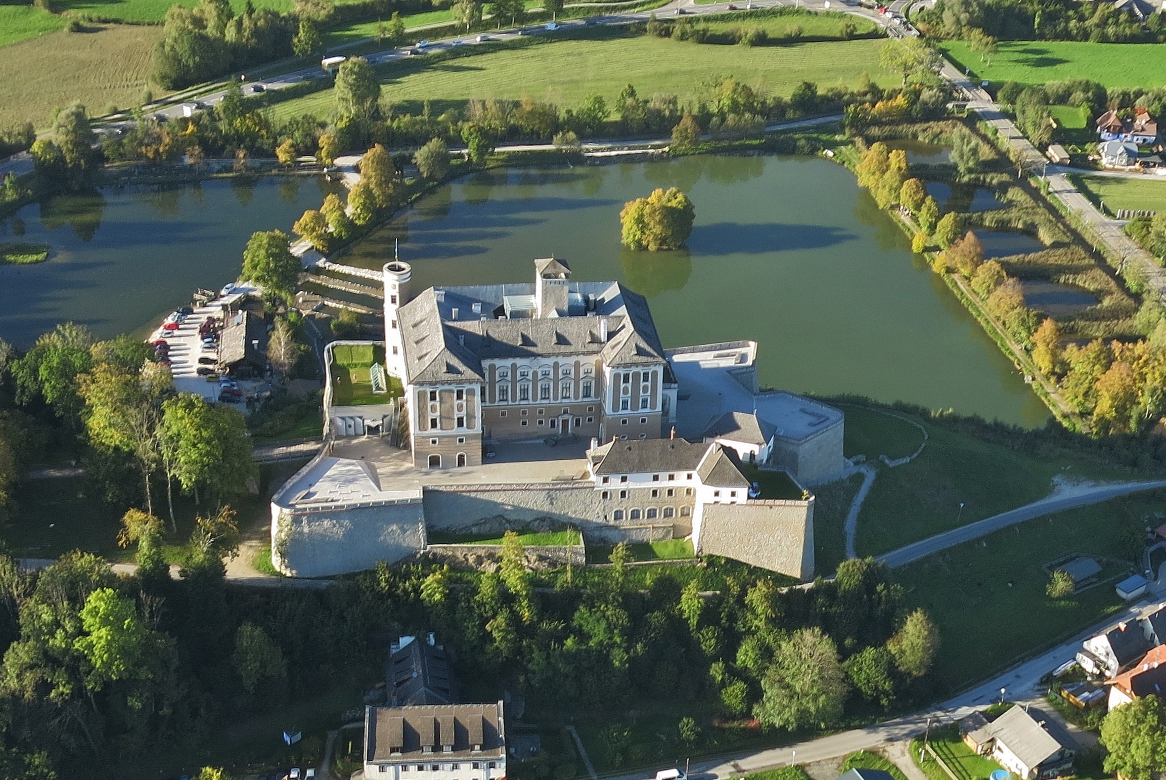 Schloss Trautenfels (Neuhaus) samt Kapelle